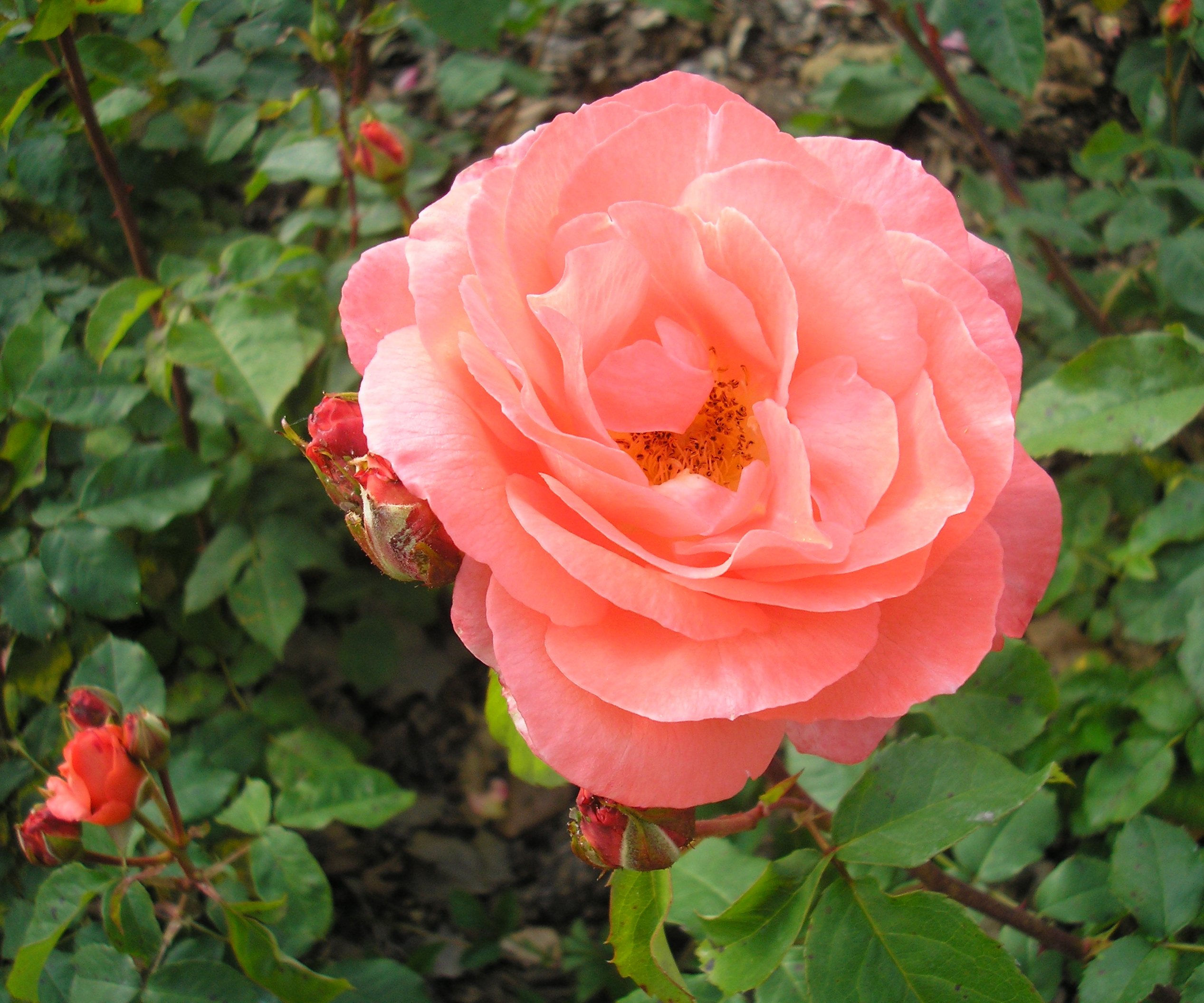 Rose 'Spartan', roseraie de la Colline aux Oiseaux à Caen (Normandie, France).